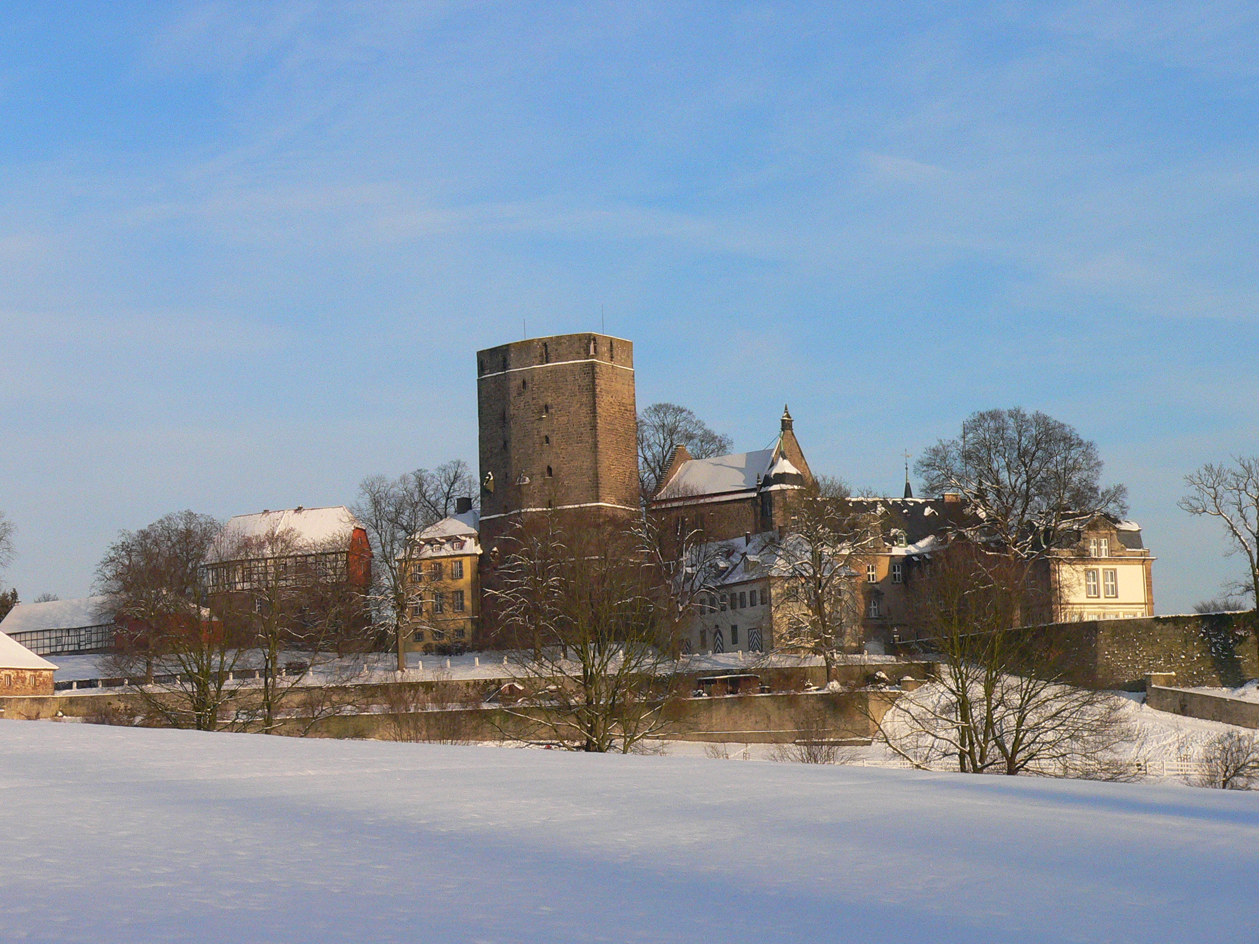 Burg Adelebsen Westseite